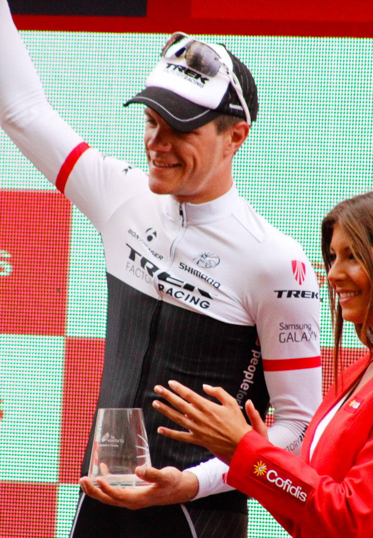 Vuelta a España 2015 | 8ª Etapa Puebla de Don Fadrique - Murcia-89